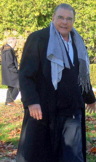 El actor español Juan Luis Galiardo